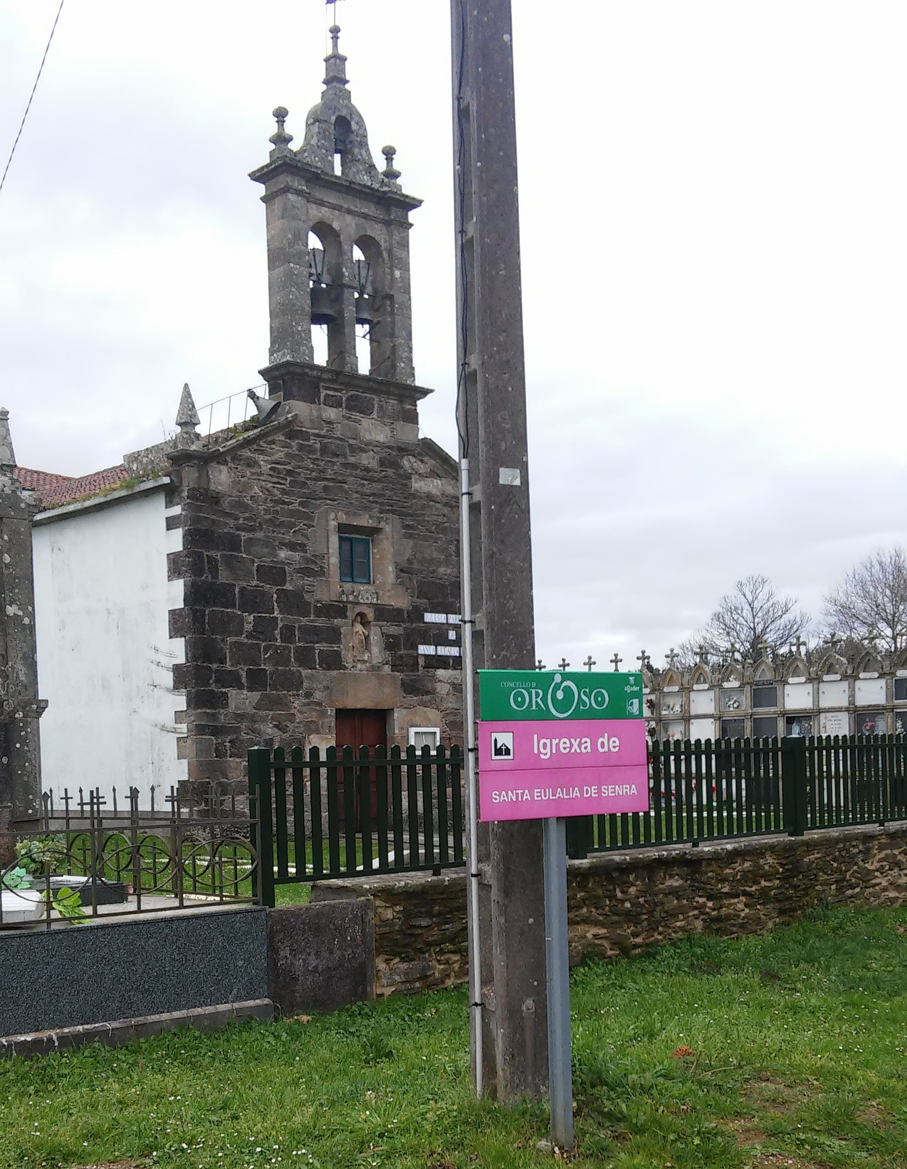 Santa eulalia de senra